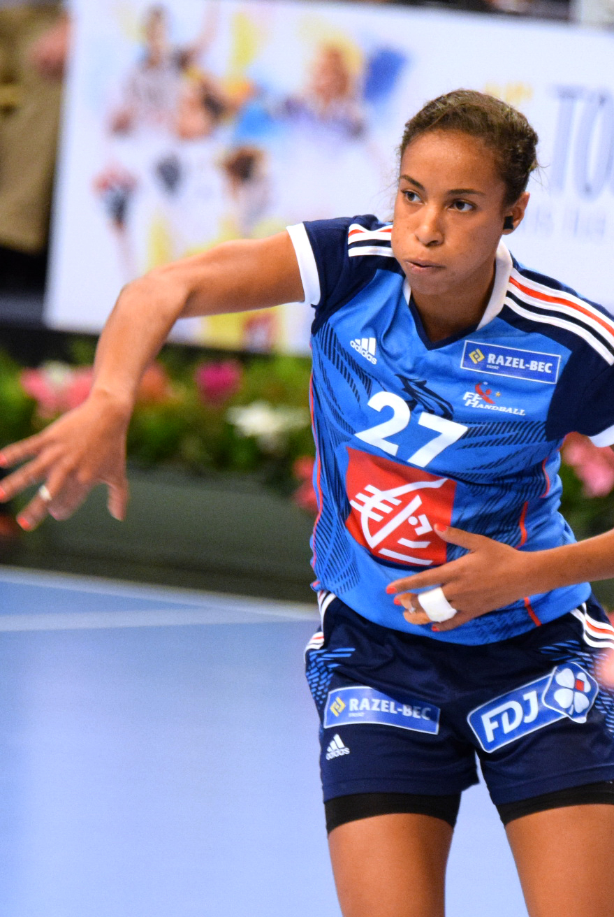 Estelle Nze Minko ,le 29 novembre 2015, lors du match France / République Tchèque pour le compte du TIPIFF 2015. Au stade Pierre de Coubertin à Paris.